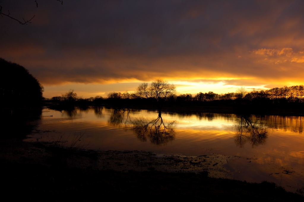 Blick auf die Wümmeniederung bei der Scheeßeler Mühle kurz vor einem Gewitter. Selbst fotografiert mit einer Nikon D70, 18-70mm Nikon Zoom.